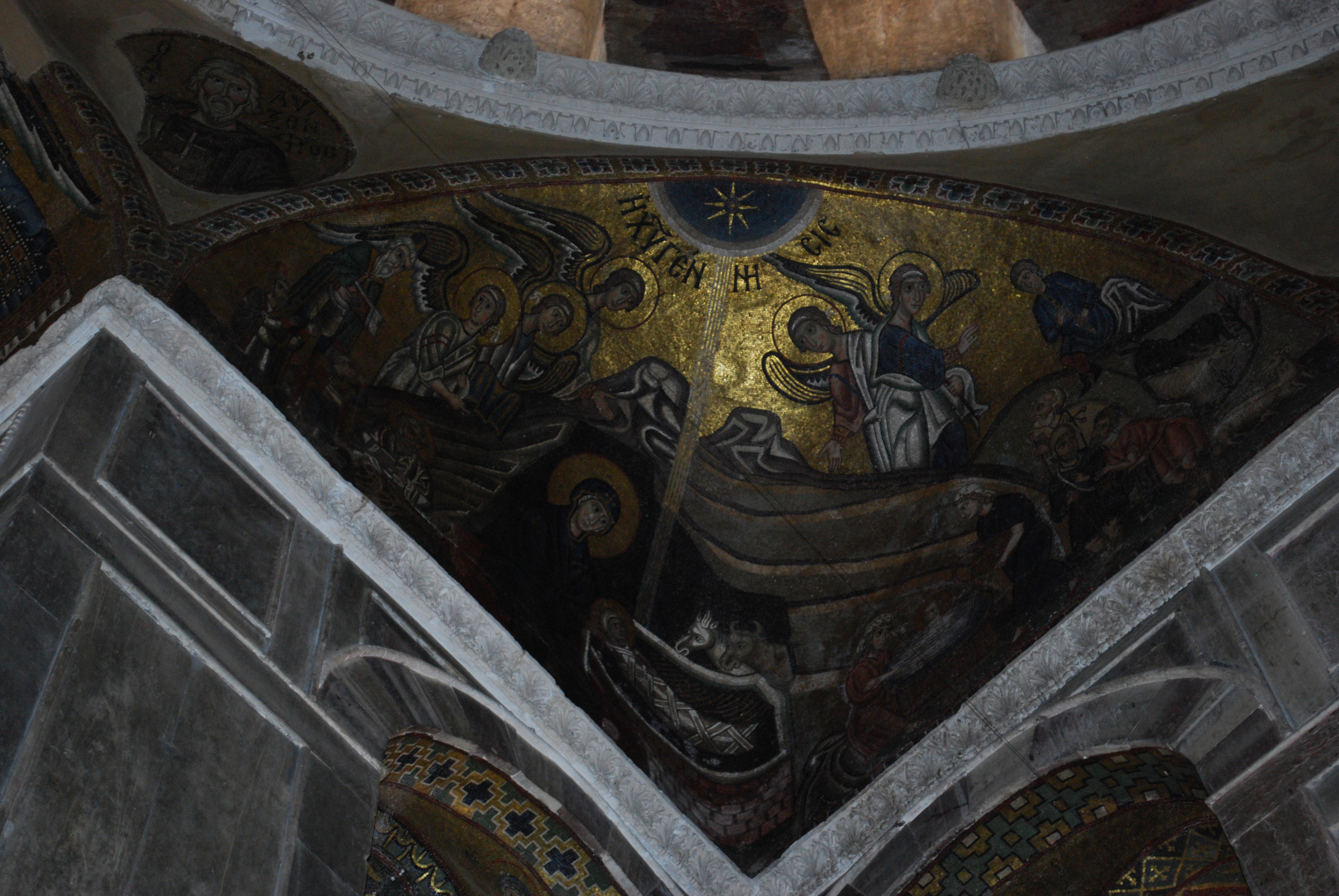 Vue du monastère de Hosios Loukas, en Béotie.